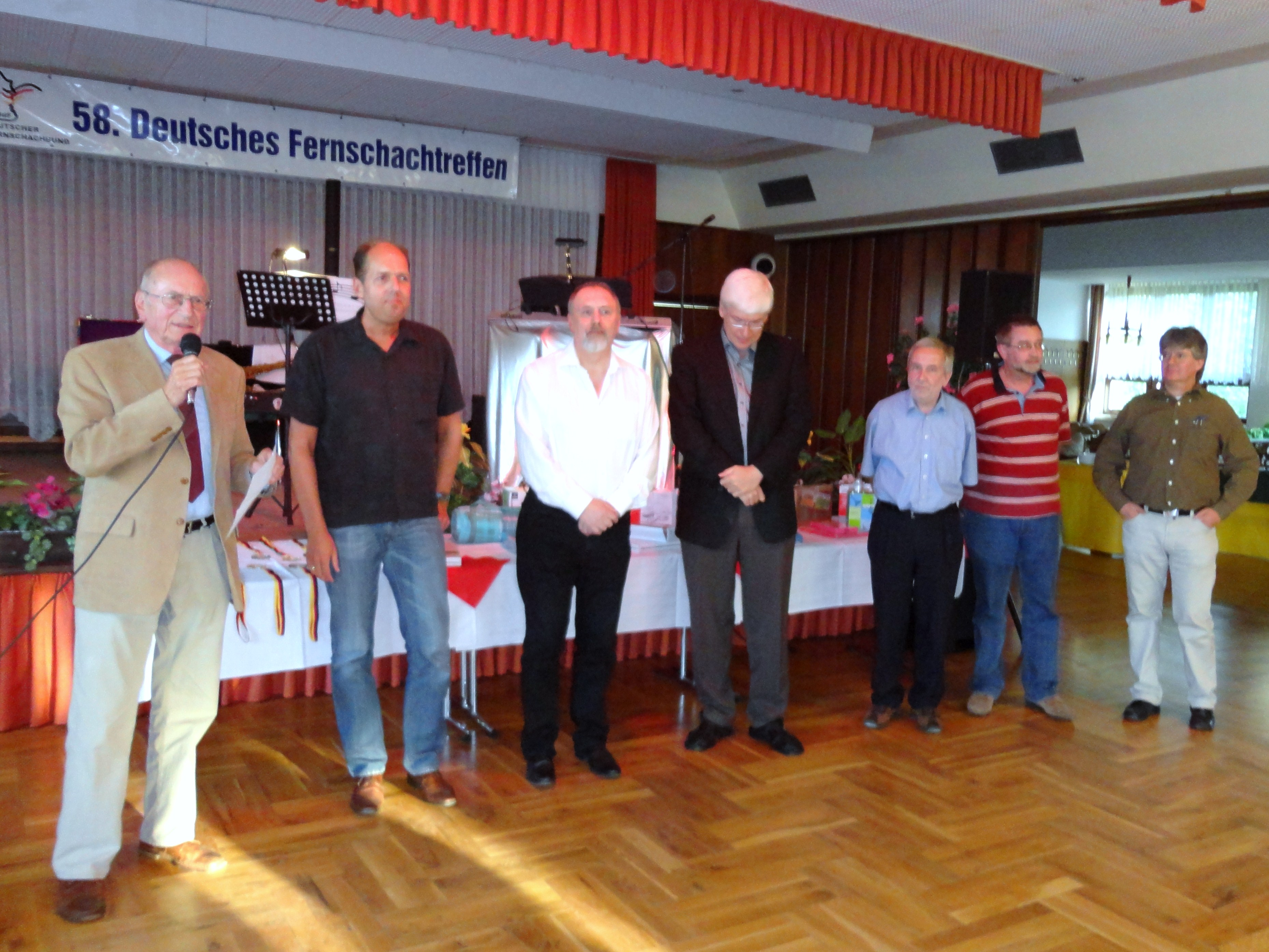 Ehrung der Olympiasieger im Fernschach, 2012 im Saal des Bürgerhauses in Tambach-Dietharz (von links nach rechts: Fritz Baumbach, Maximilian Voss, Arno Nickel, Stephan Busemann, Wunderlich und Gerd Müller, sowie Matthias Krippen).